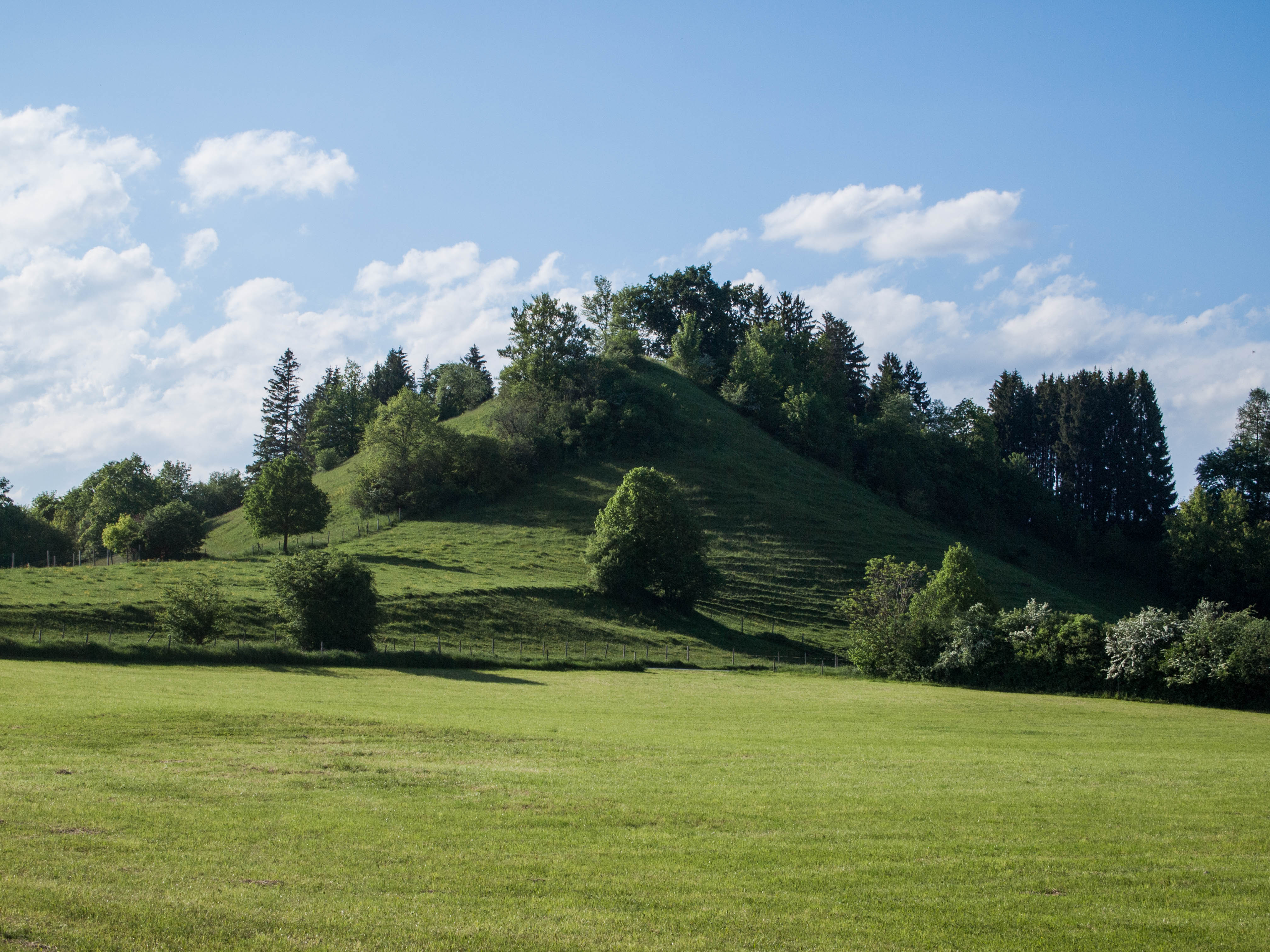 Blick von Südosten auf den Burgberg bei Burggen, Oberbayern. (LSG:BY-LSG-00228.01)_Schutz des Burgberges, Gemeinde Burggen, Geotop-Nummer: 190R002 Burgberg bei Burggen.